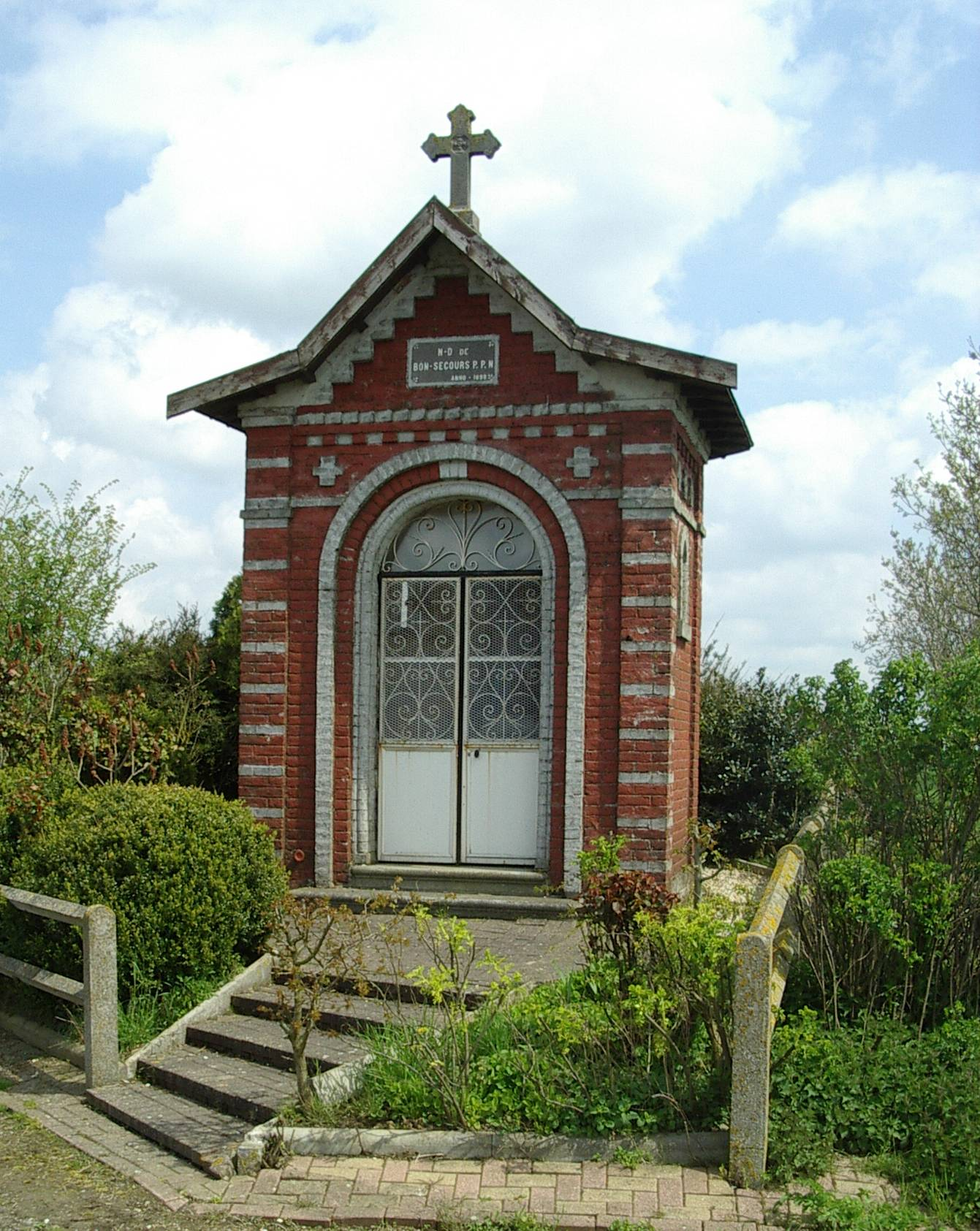 La Chapelle Notre-Dame du Bon Secours date de 1 822 et se trouve à l'entrée de Saint-Vaast en Cis, en venant de Solesmes.Photo prise par J.C HOUDOT.